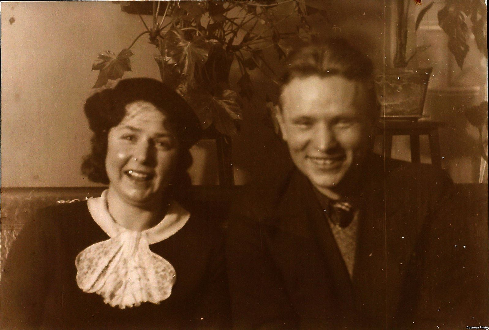 Беларуская (тарашкевіца): Натальля Арсеньнева з Максімам Танкам. 1936.